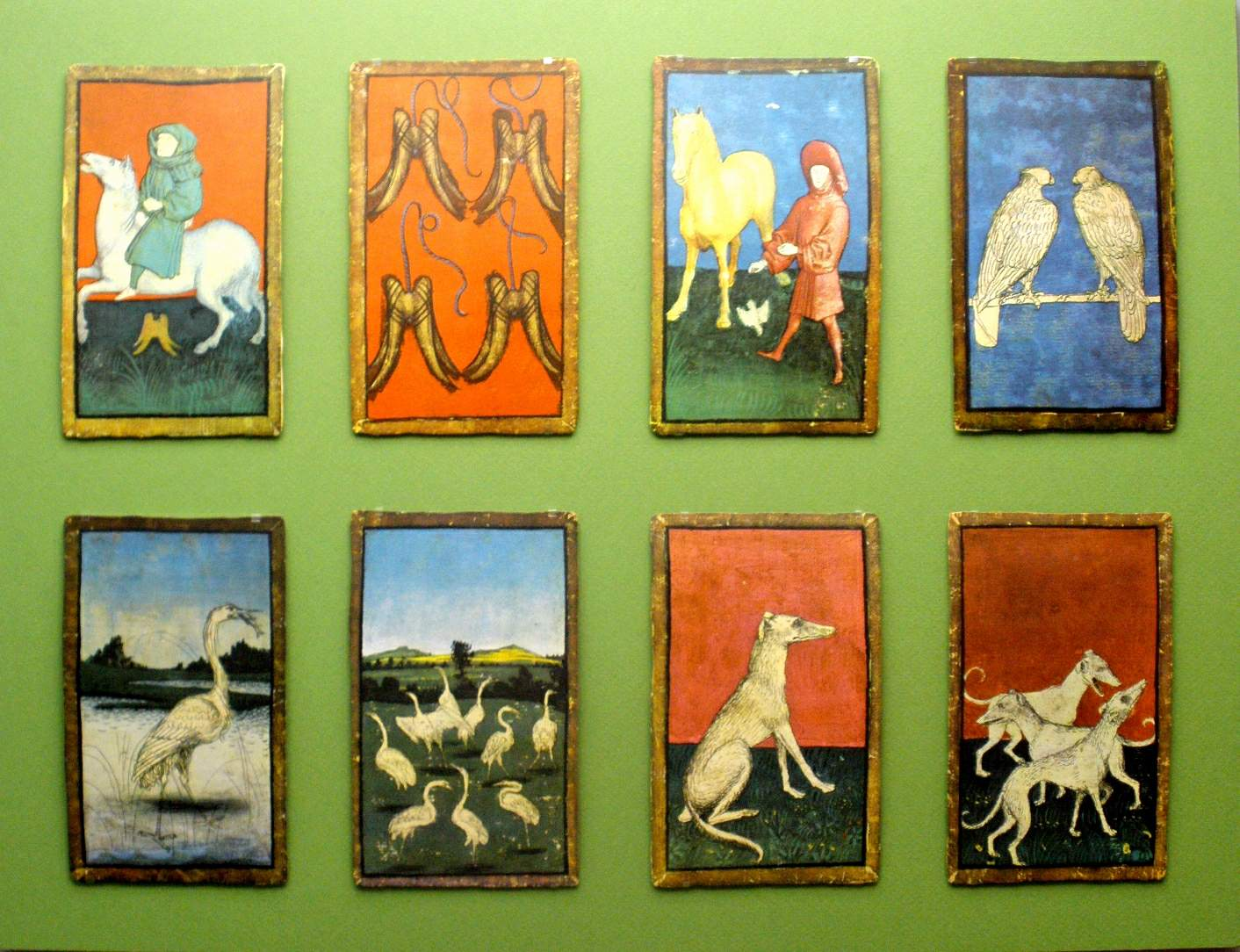 Museo Fournier de Naipes de Álava (Vitoria-Gasteiz)